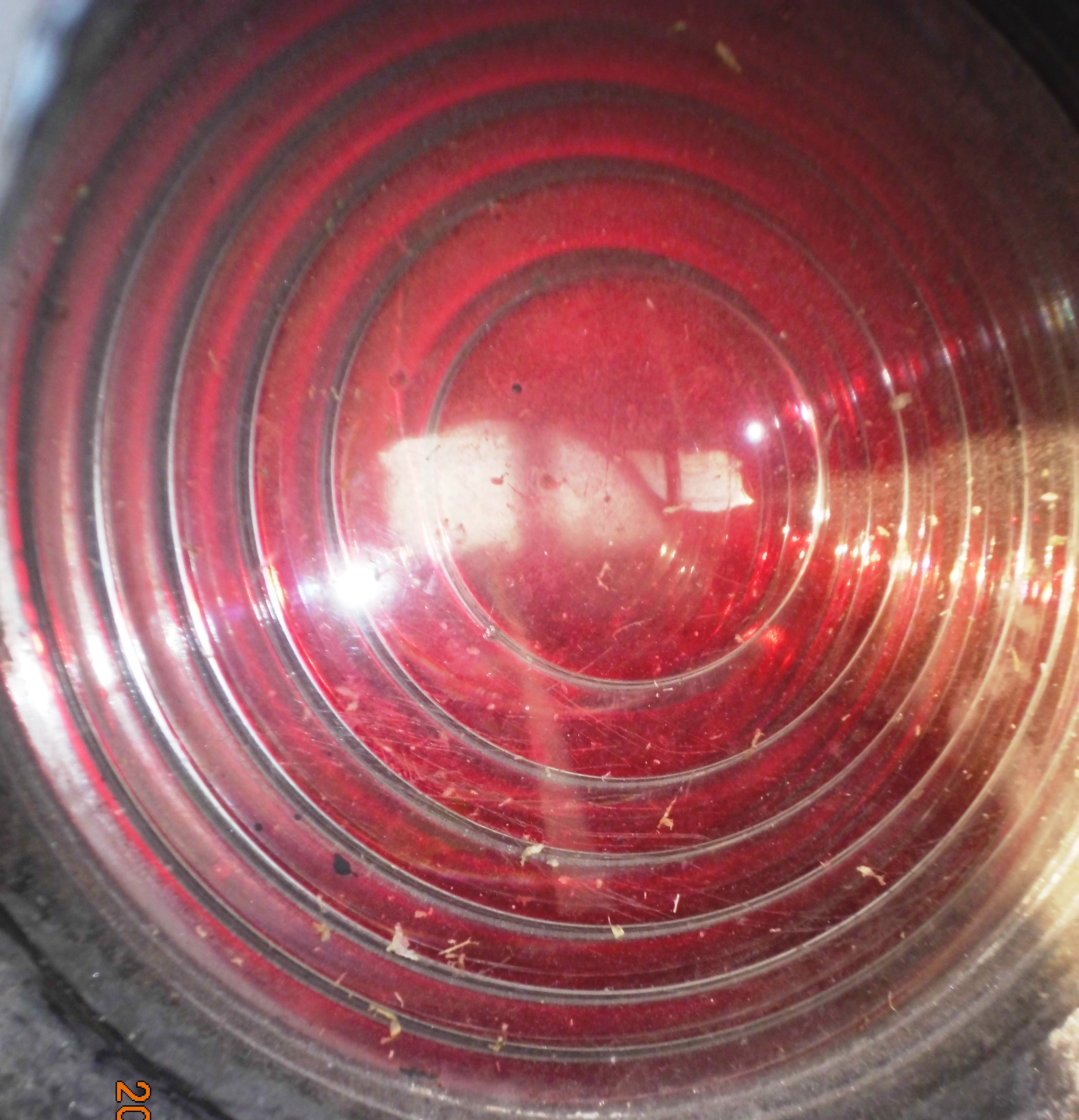 Маневровый светофор. Красный сигнал. Линза Френеля Россия.